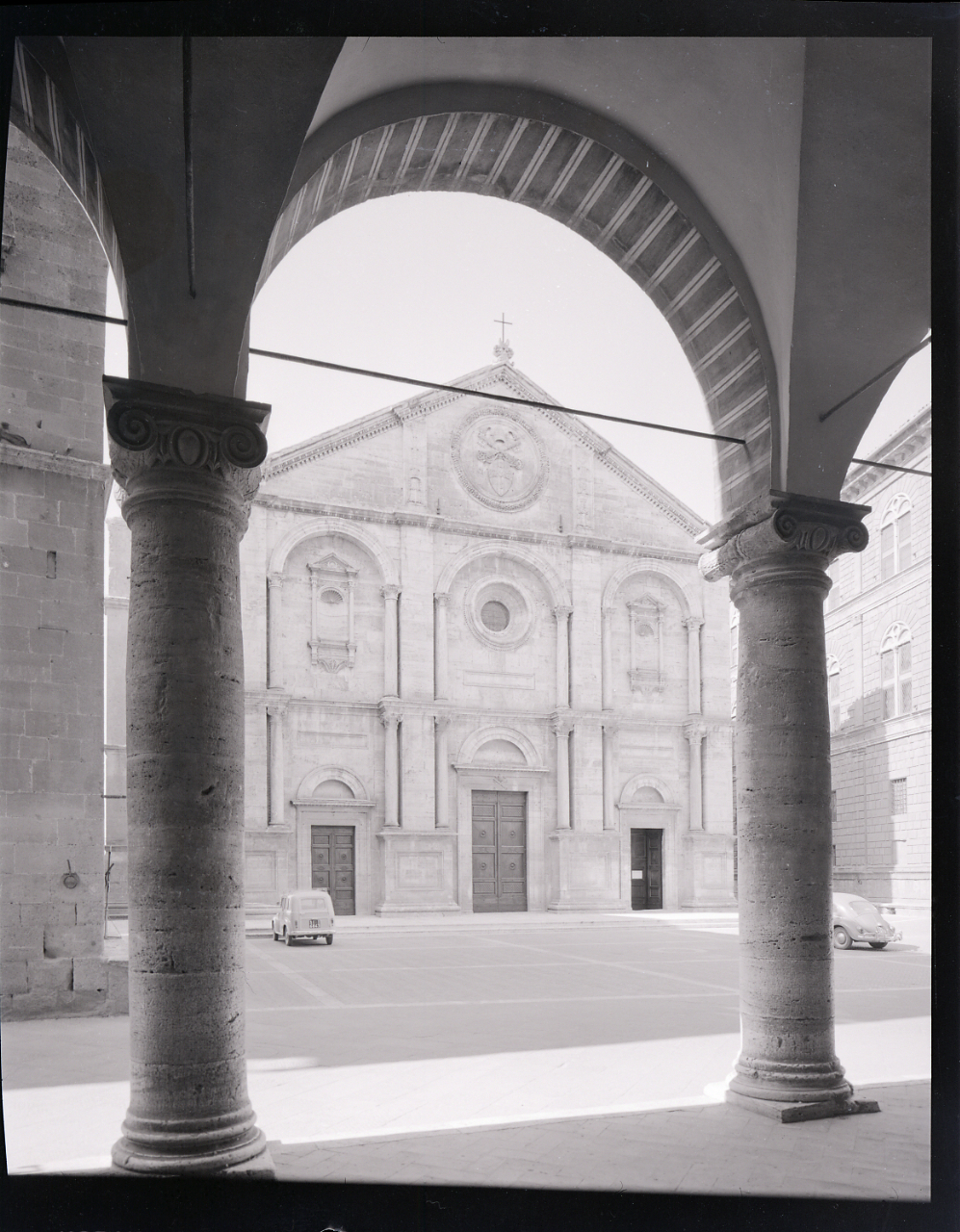 Servizio fotografico : Pienza, 1965 / Paolo Monti. - Buste: 3, Fototipi: 3 : Negativo b/n, gelatina bromuro d'argento/ pellicola ; 10x12. - ((Serie costituita da 3 negativi identificati con i nn.: 11049-11051. La suddetta serie è contenuta nella scatola identificata con la numerazione G11001-11500. - Occasione: Documentazione per la pubblicazione: "Emilio CECCHI, Natalino SAPEGNO (a cura di), Storia della Letteratura Italiana, 9 voll., Milano, Garzanti, 1966 e segg.". - Fonte: Rubrica di Paolo Monti: Monti/ 2/ 6 giugno 1964 - 31 marzo 1966/ 8194-12420 (1964-1966), presso Archivio Paolo Monti